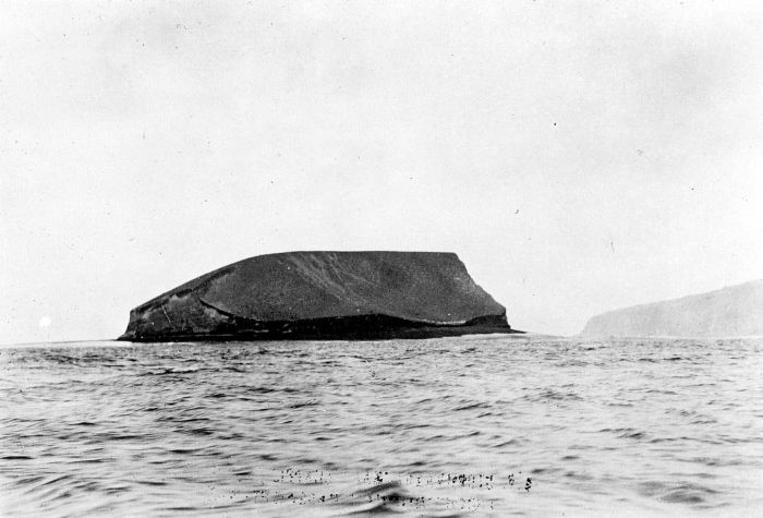 Repronegatief. Het eiland Anak Krakatau, gevormd na de eruptie van de Krakatau